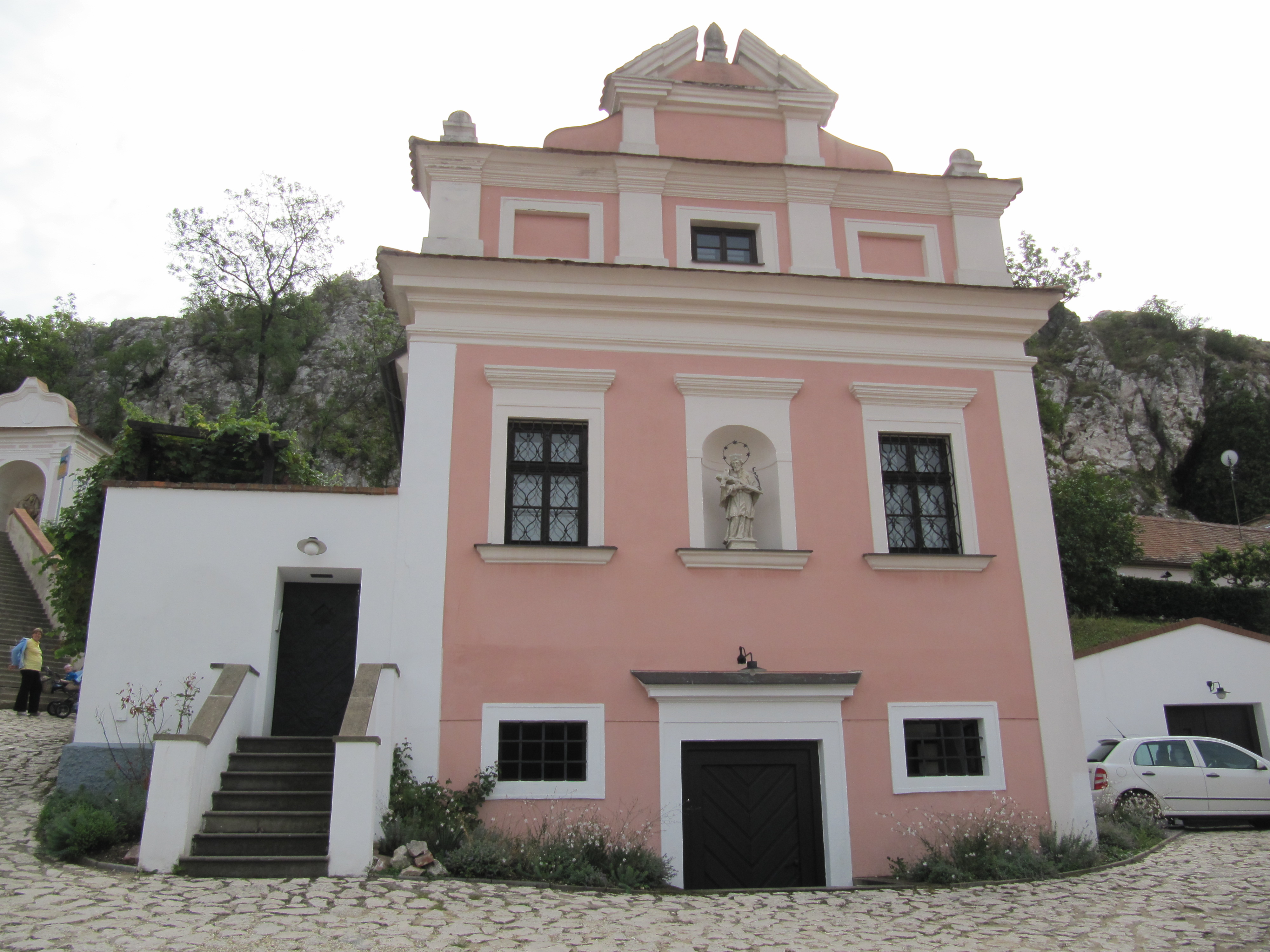 Měšťanský dům (piaristický dům), Novokopečná 810/3, Mikulov